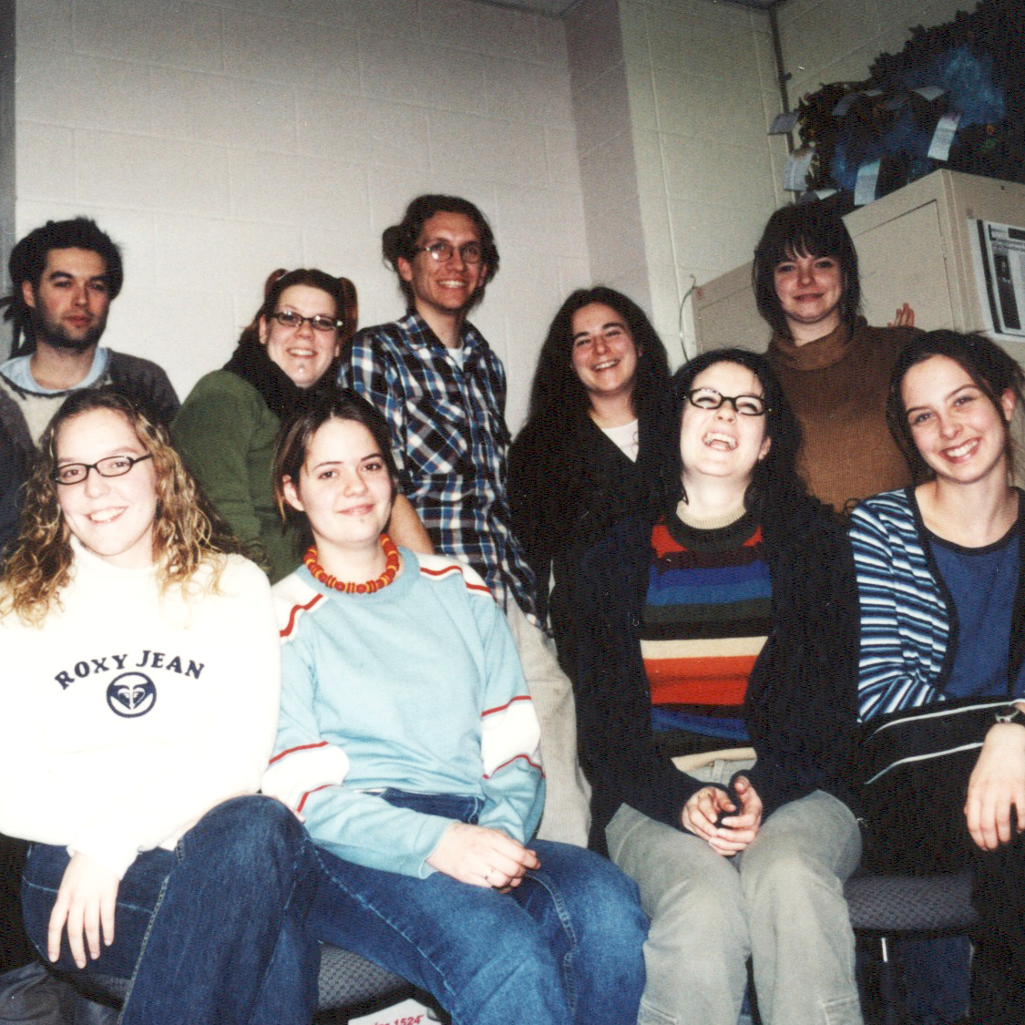 Les participants (tes) a l'ensemencement 1 (Flèche de tacons bleus et exposition à la galerie Le Lieu) du projet « Le Fraie » conçu et produit par Interaction Qui. (Alma, Québec, Canada, 2002)